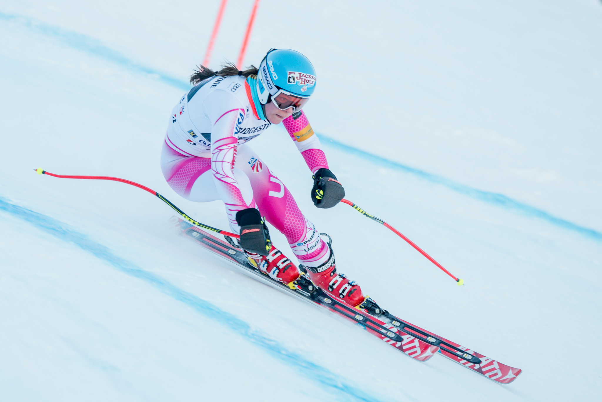 64. Kandahar Rennen,Audi FIS Ski Weltcup Garmisch-Partenkirchen,Breezy Johnson,Damen Abfahrt,Kandahar,Ladies Downhill